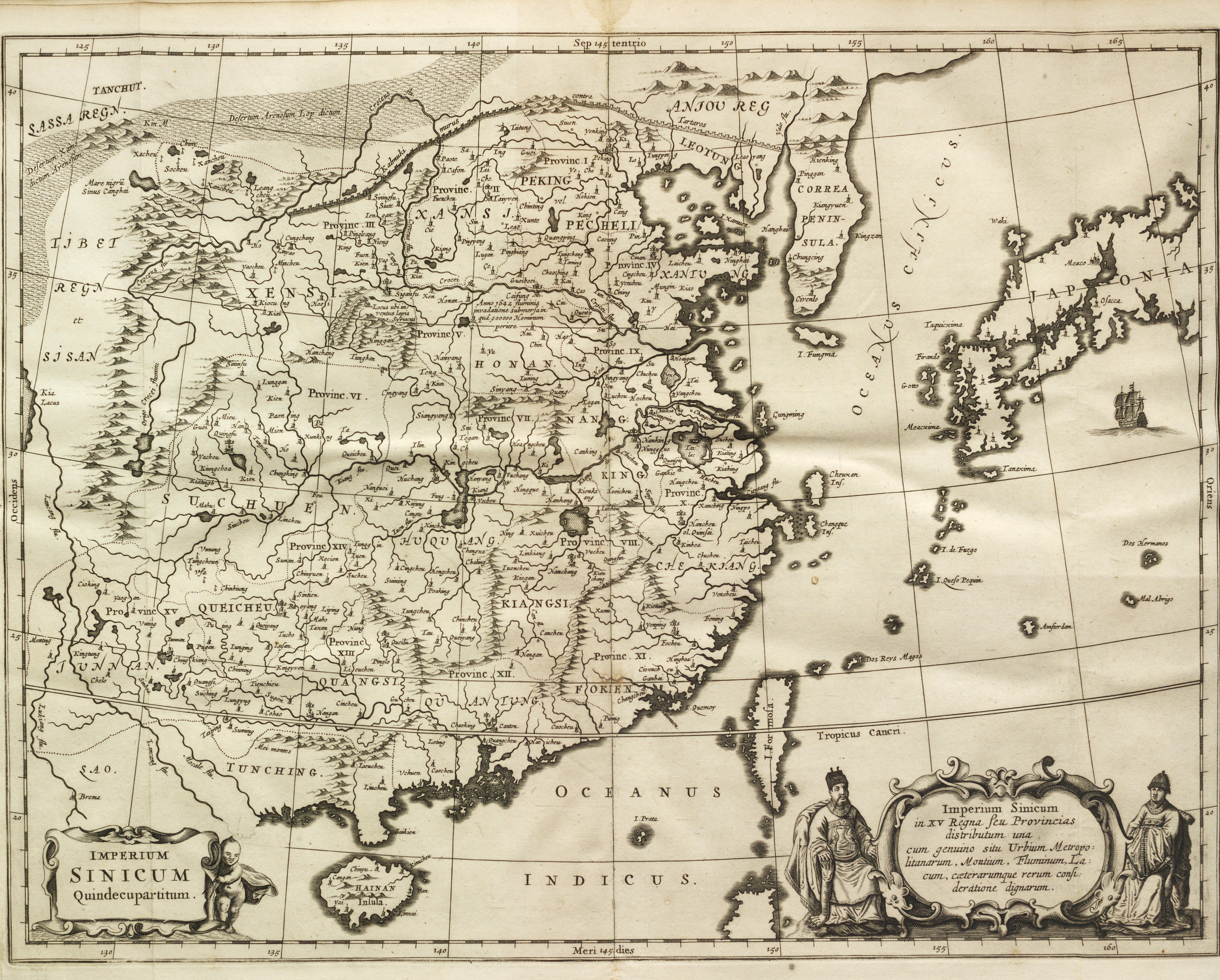 Karte von China, Scan einer Karte von 1667, Quelle: aus der englischen Wikipedia (Quellenangabe dort: gemeinfrei